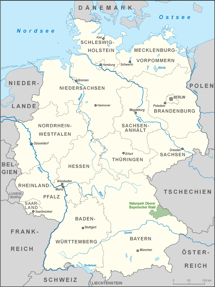 Karte des Naturparks Oberer Bayerischer Wald in Deutschland